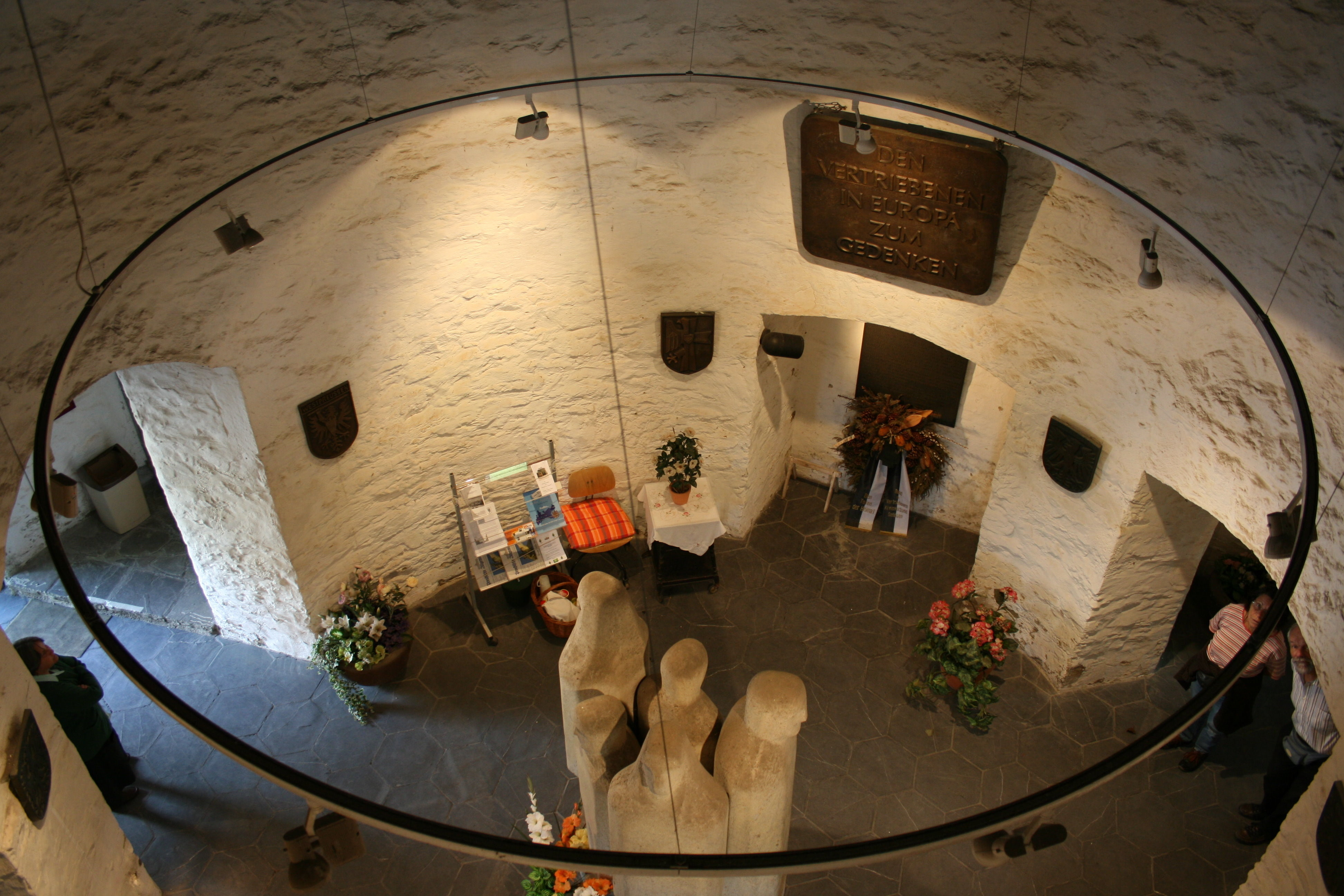 Mahnmal der Vertreibung in Europa im Batterieturm von Schloss Burg in Solingen-Burg